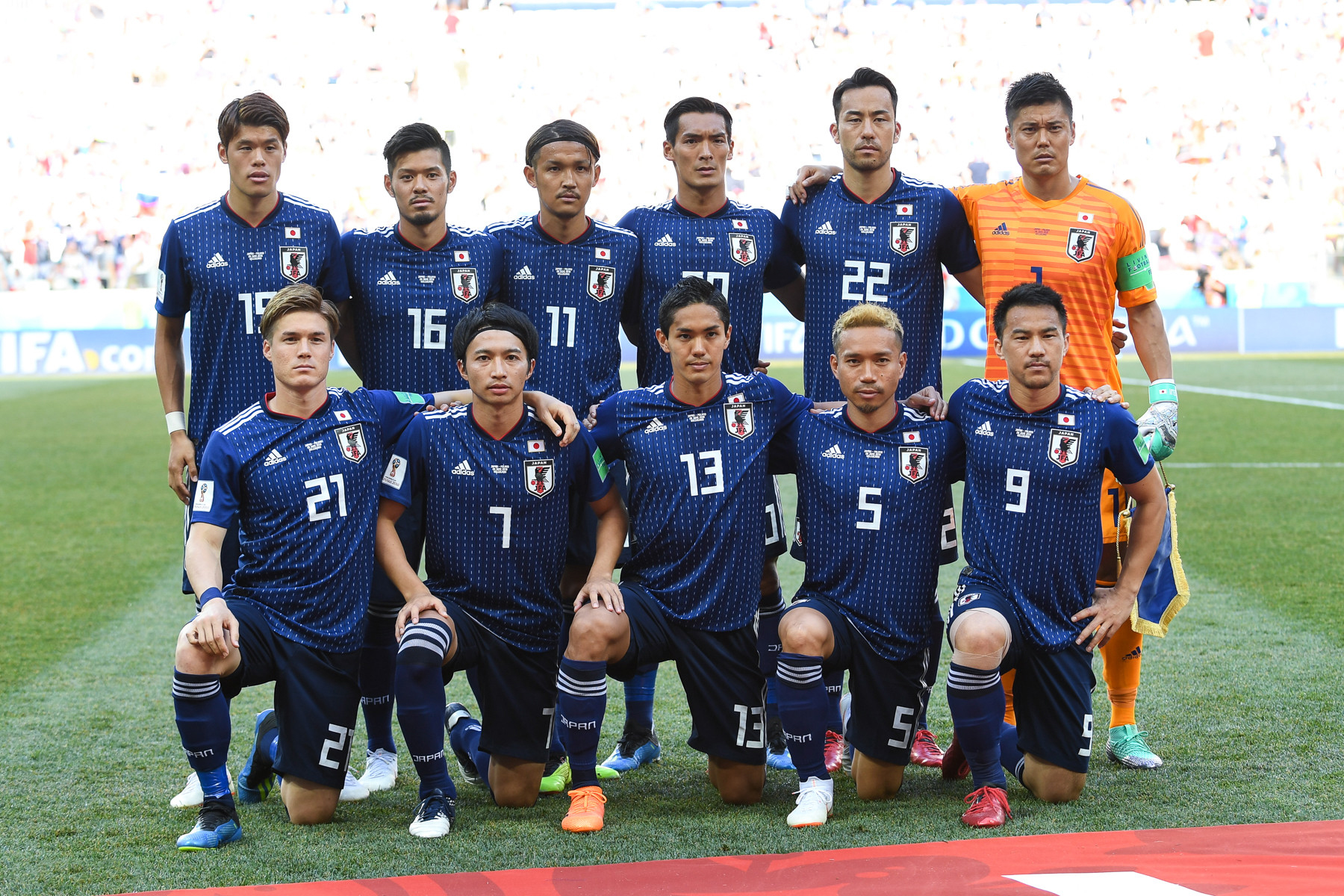 Япония проиграла Польше, но вышла в плей-офф